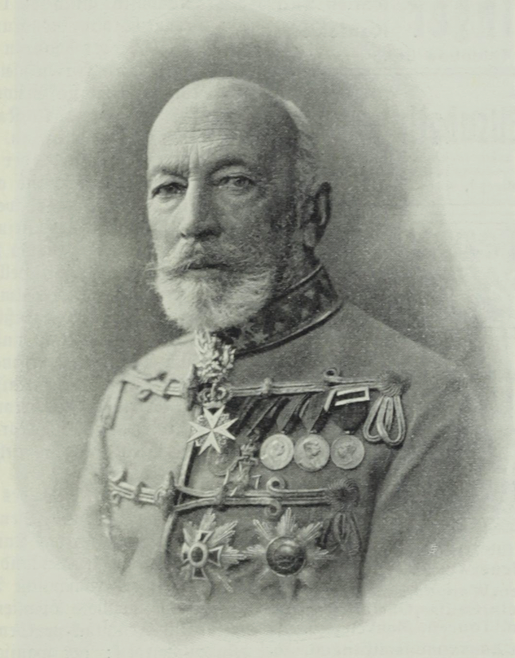 Viktor Graf Dubský von Třebomyslice (1834–1915), Austrian general and diplomat